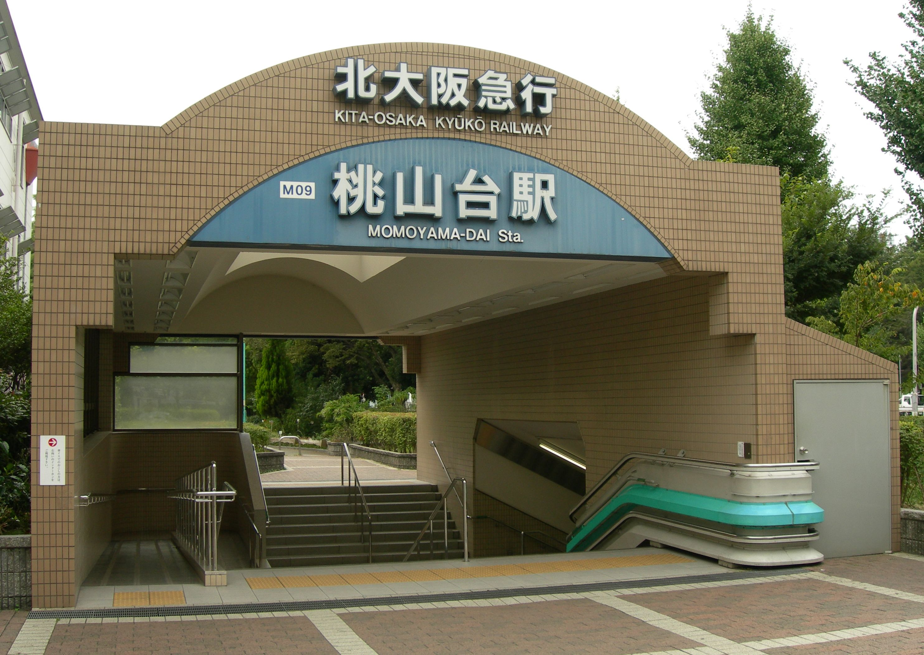 桃山台駅東口